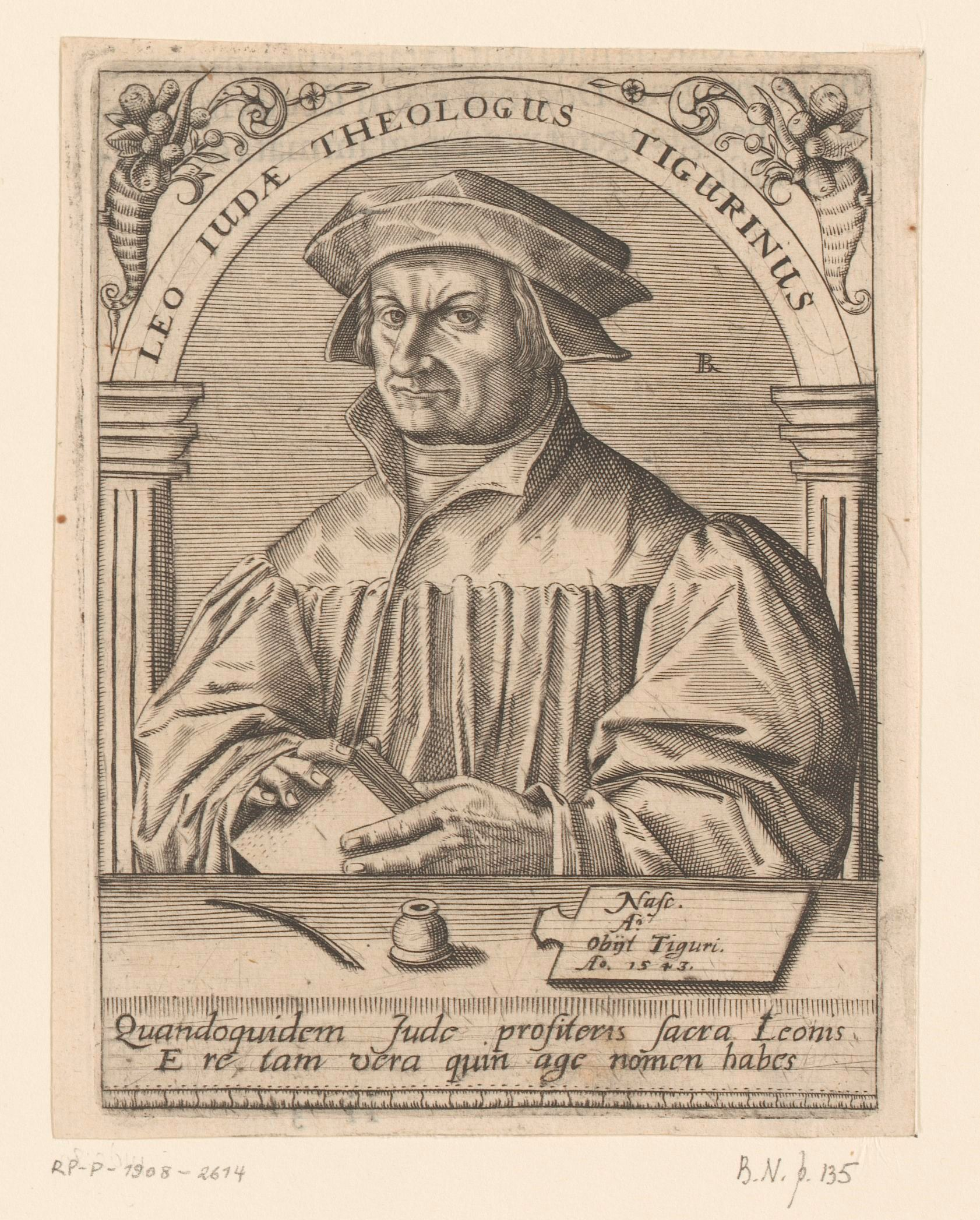 IdentificatieTitel(s): Portret van Leo JudLeo Judae theologus tigurinus (titel op object)Serie portretten van vijftiende- en zestiende-eeuwse geleerden (serietitel)Objecttype: prent boekillustratie Objectnummer: RP-P-1908-2614VervaardigingVervaardiger: prentmaker: Robert Boissard (vermeld op object)prentmaker: Johann Theodor de Bry (verworpen toeschrijving)uitgever: Guilielmi FitzeriPlaats vervaardiging: FrankrijkDatering: 1597 - 1599Fysieke kenmerken: gravure; tekst in boekdruk op versoMateriaal: papier Techniek: graveren (drukprocedé) / boekdrukAfmetingen: plaatrand: h 143 mm × b 107 mmToelichtingPrent uit: Boissard, Jean-Jacques; Bry, Theodoor de; e.a. Bibliotheca sive thesaurus virtutis et gloriae in quo continentur illustrium eruditione et doctrina virorum effigies et vitae (...). Frankfurt: Guilielmi Fitzeri, 1628.OnderwerpWat: historical personsbookink-wellWie: Leo JudVerwerving en rechtenVerwerving: aankoop 1905Copyright: Publiek domein